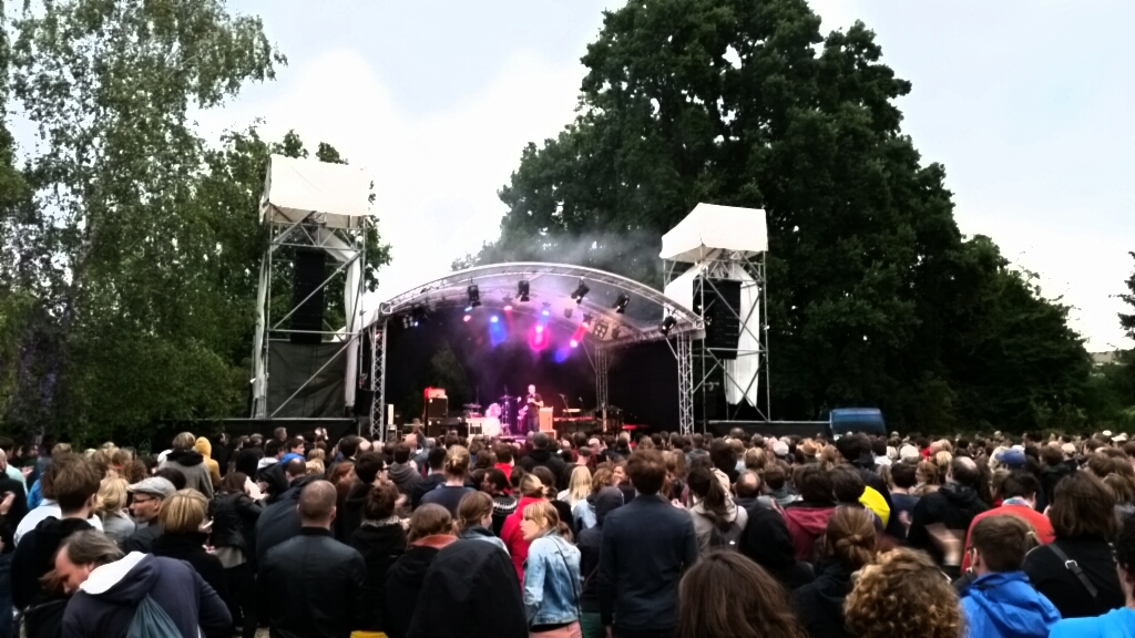 Bühne auf dem Heimspiel Knyphausen 2015